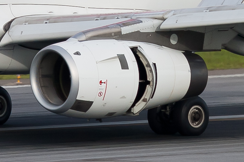 Just Landed